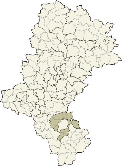 Powiat bielski w województwie śląskim